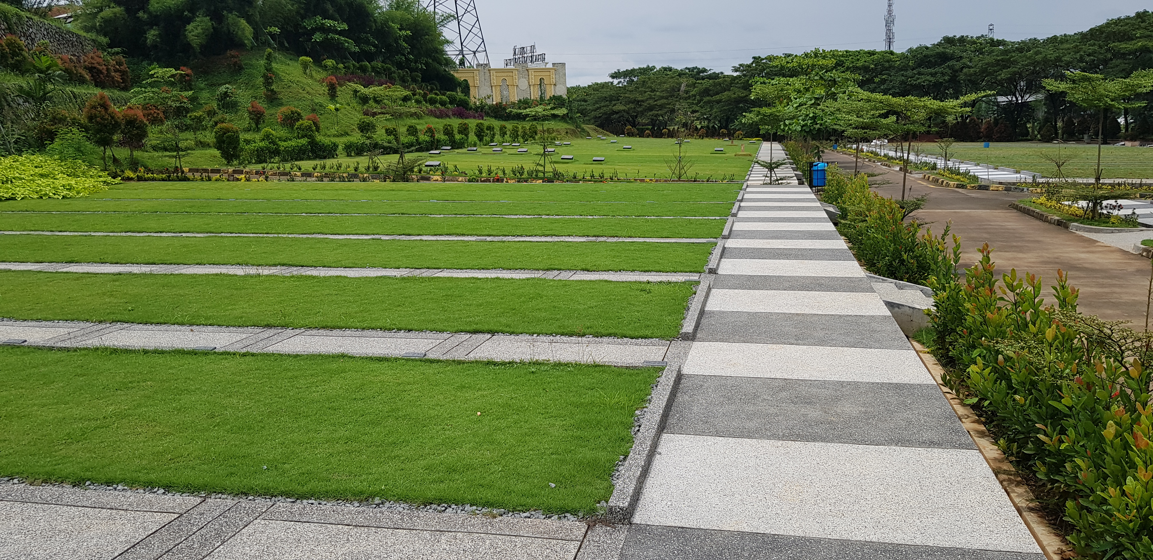 Al-Azhar Memorial Garden menerapkan konsep taman adalah bagian dari makam